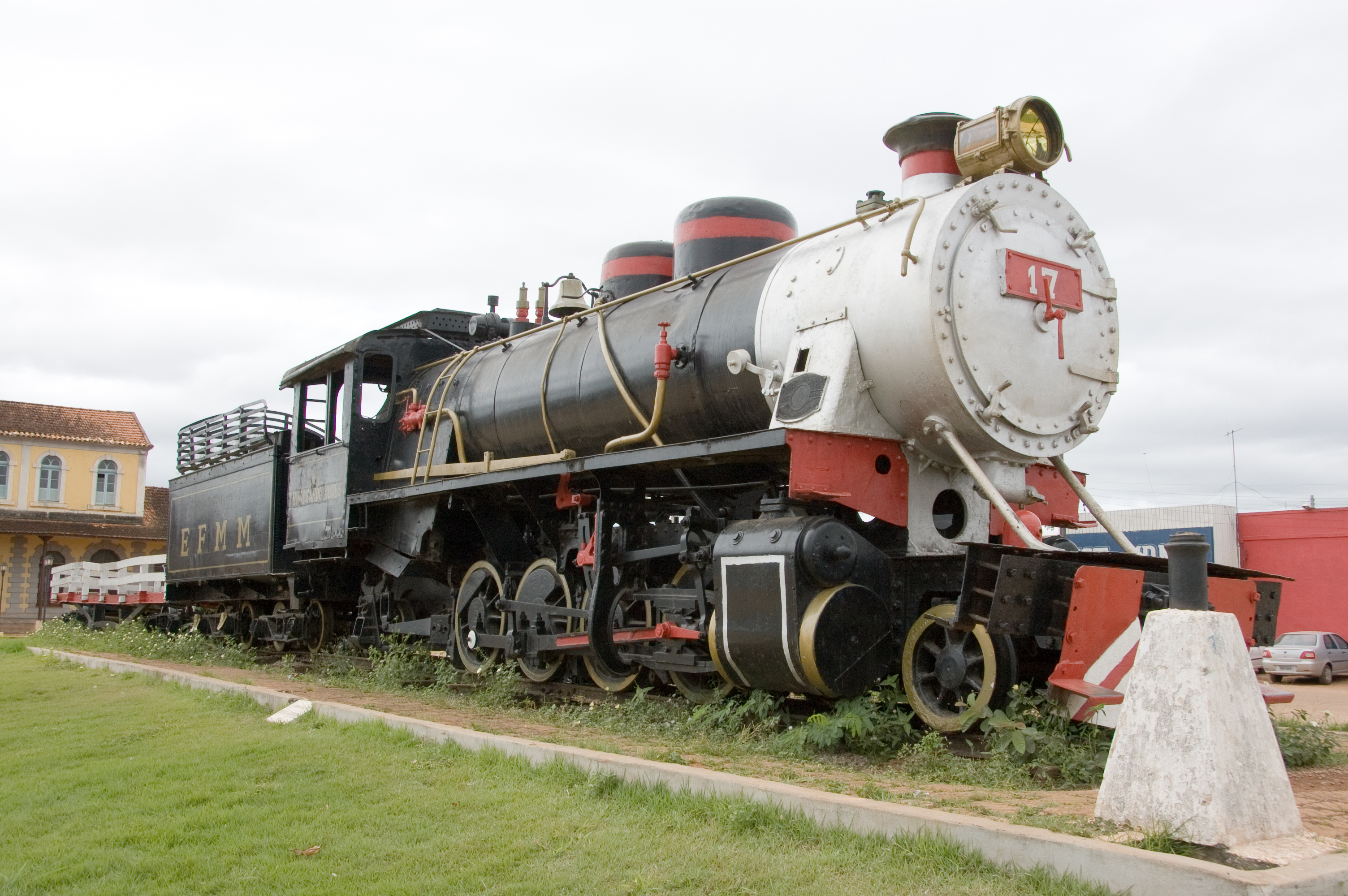 Denkmal einer Dampflok der "Estrada de Ferro Madeira-Marmoré" in Guajará-Mirim, Rondônia, Brasilien. Seiteninschrift: "ENG. HIDELGARDO NUNES"